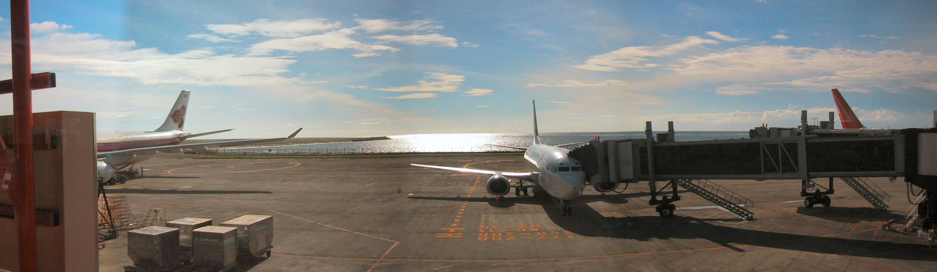 Ngurah Rai Airport Bali - Indonesia Februari 2002